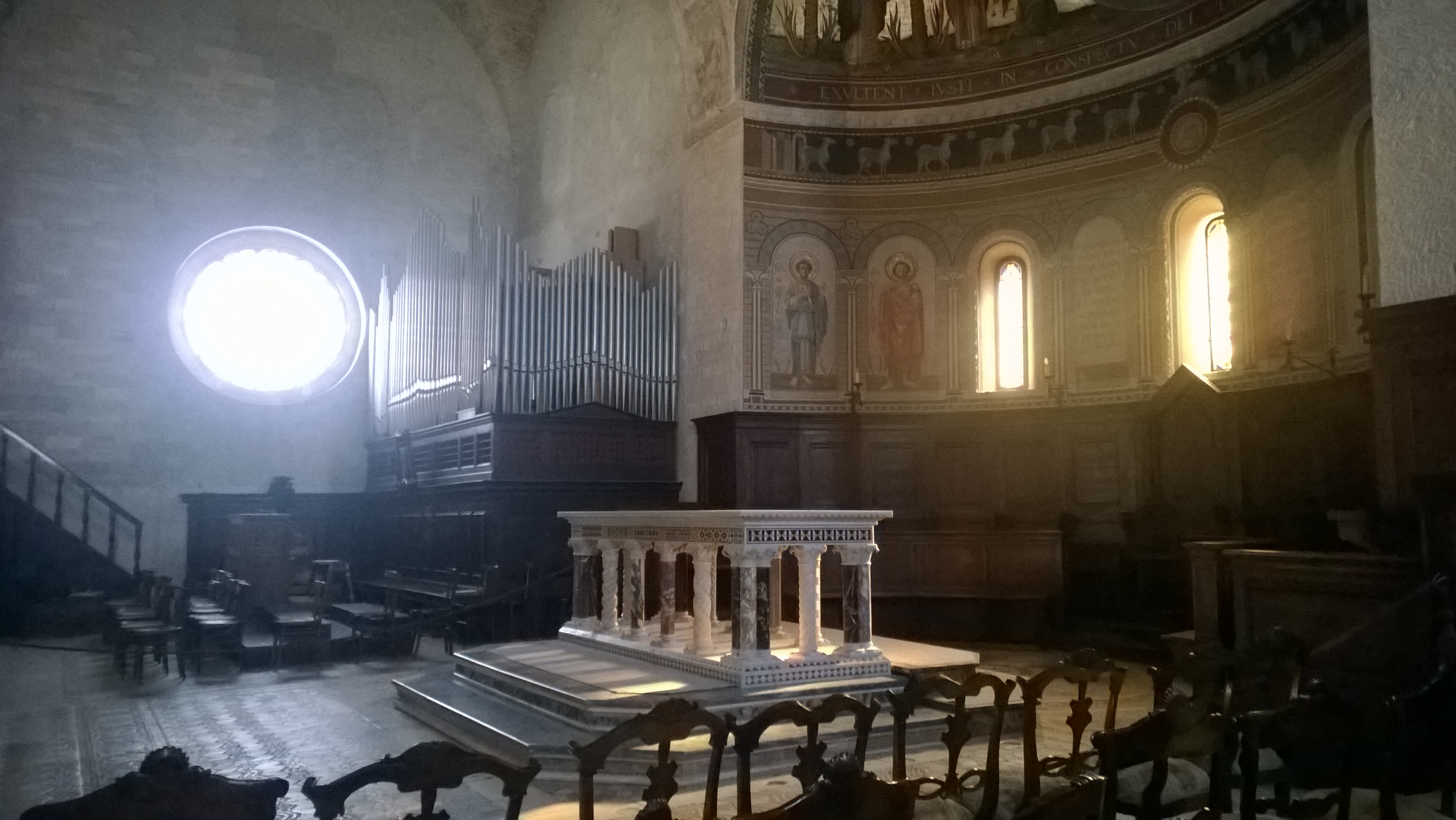 Duomo di Osimo, altare maggiore con l' organo sullo sfondo